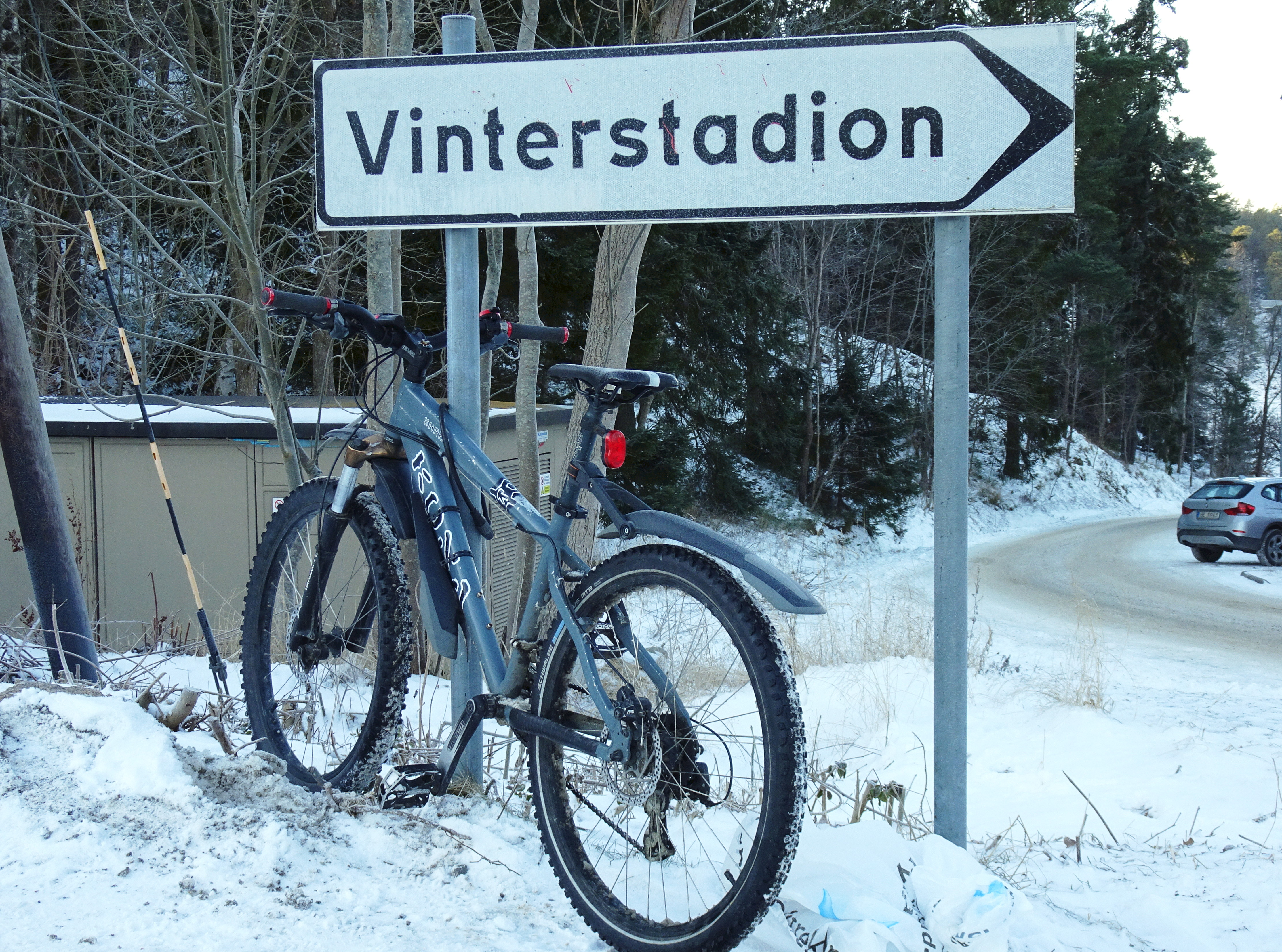 Vinterstadion, skylt, Saltsjöbaden